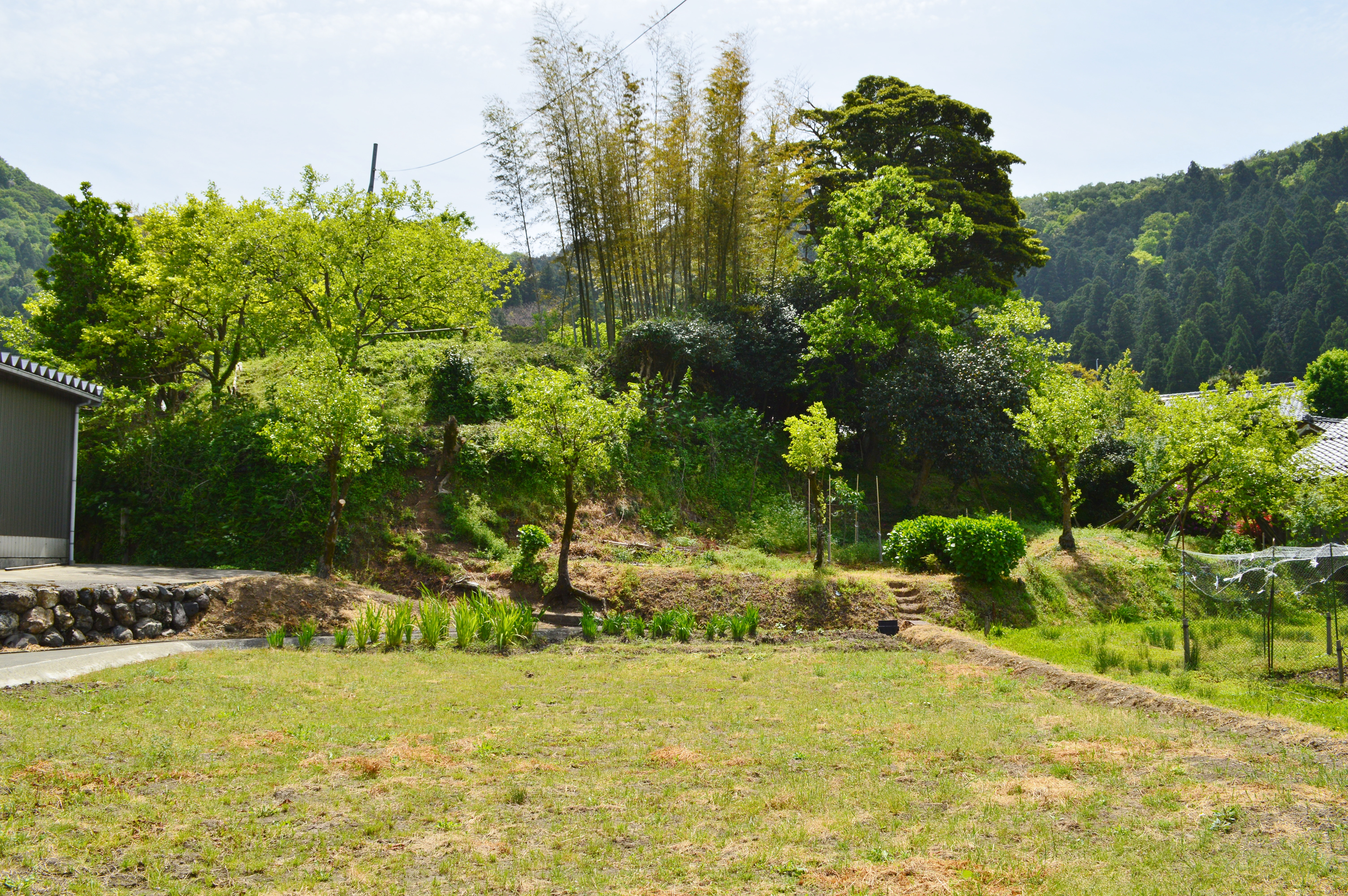 中塚古墳 (若狭町) 墳丘